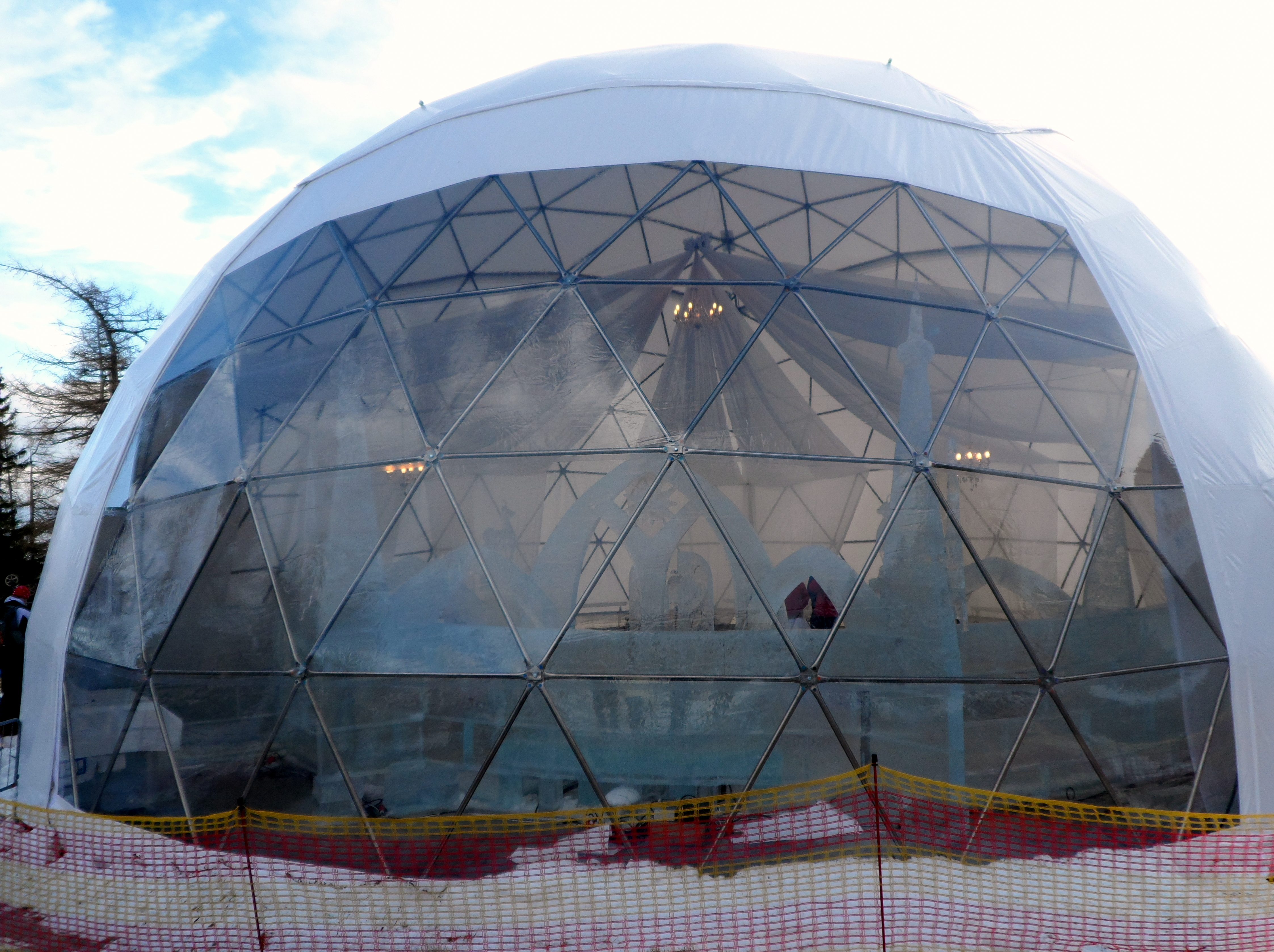 Tatranský dóm na Hrebienku